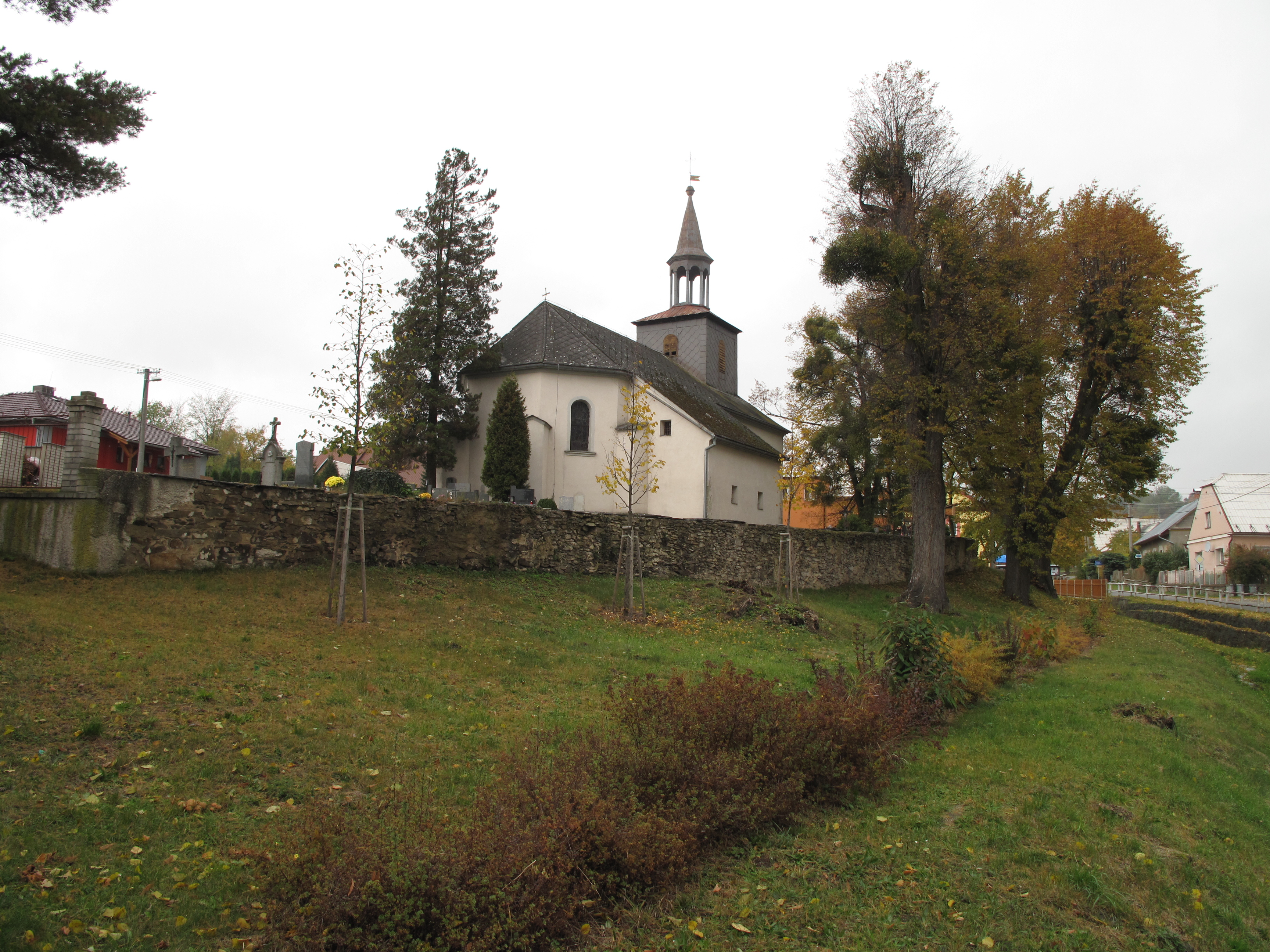 Horní Životice. Okres Bruntál, Česká republika.